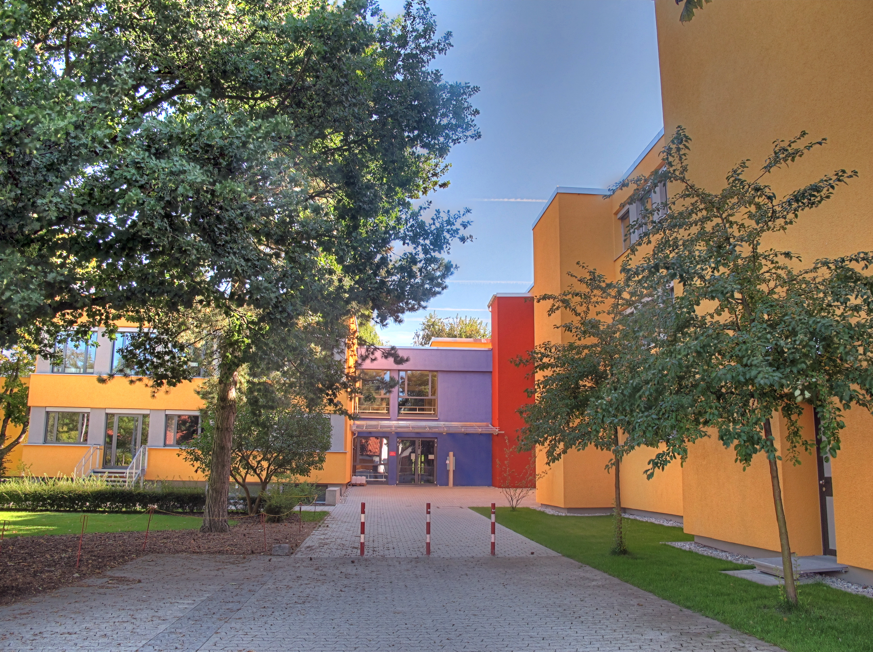 Deutschland, Bayern, Oberbayern, Landkreis Fürstenfeldbruck, Gröbenzell, Grund- und Hauptschule "Gröbenbachschule" an der Hans-Kerle-Straße (vormals: Hans-Kerle-Schule")